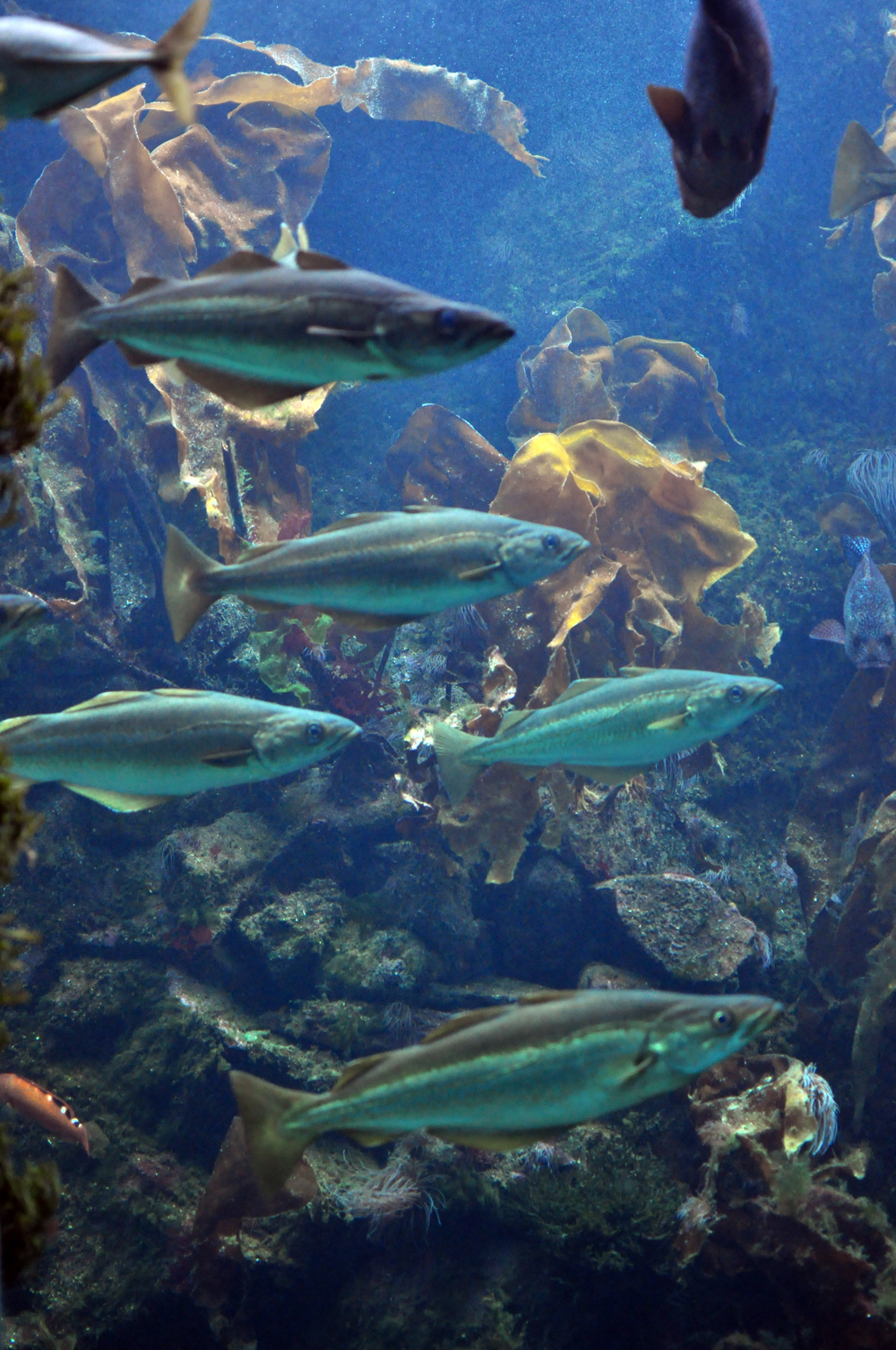 Pollachius pollachius